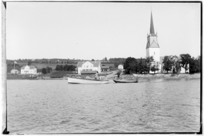 Tingnes in Ringsaker